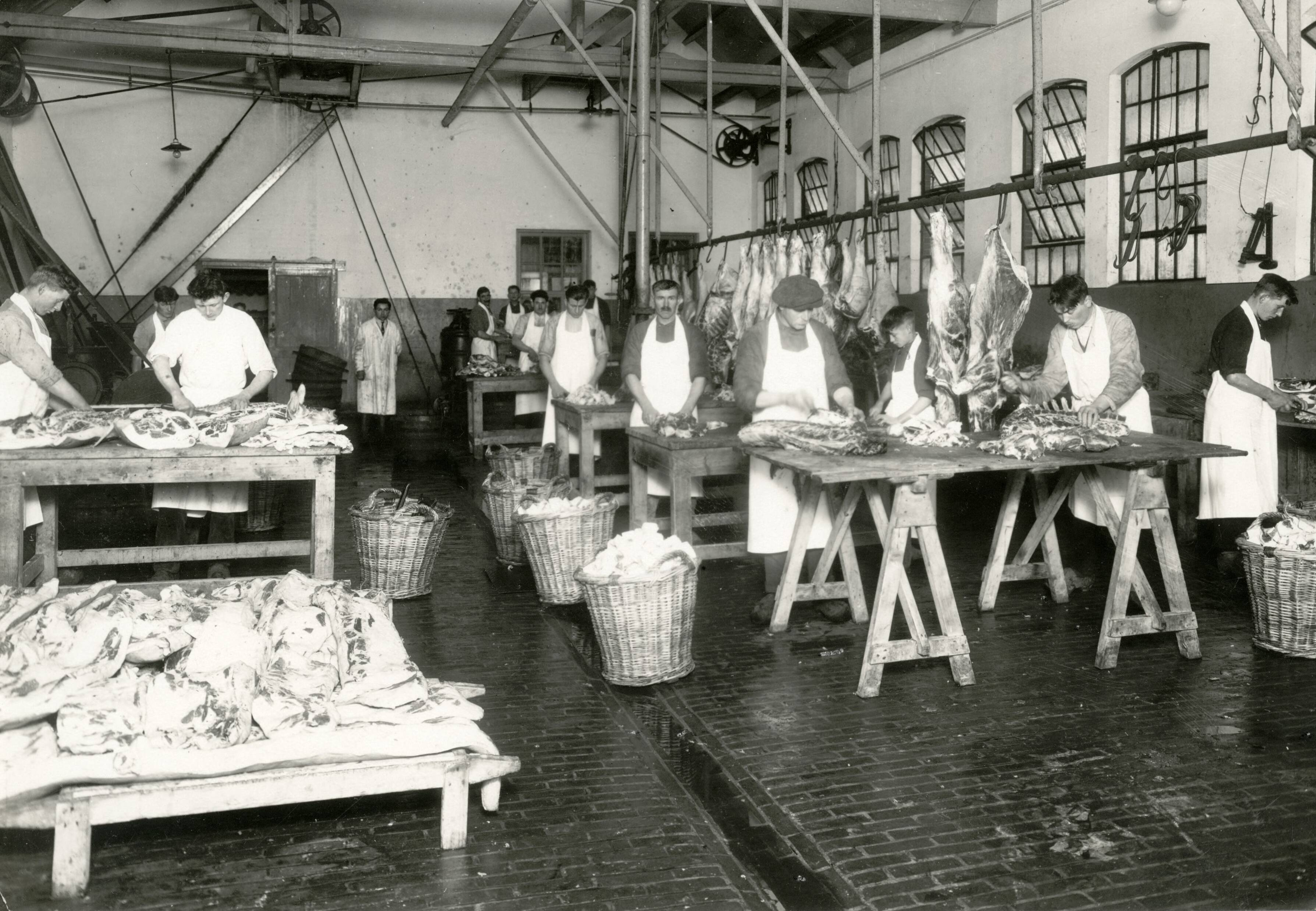 Kijkje in het interieur van Zwanenberg's slachterij in Oss, waar mannen op tafels vlees aan het uitbenen zijn. Nederland, 1923.